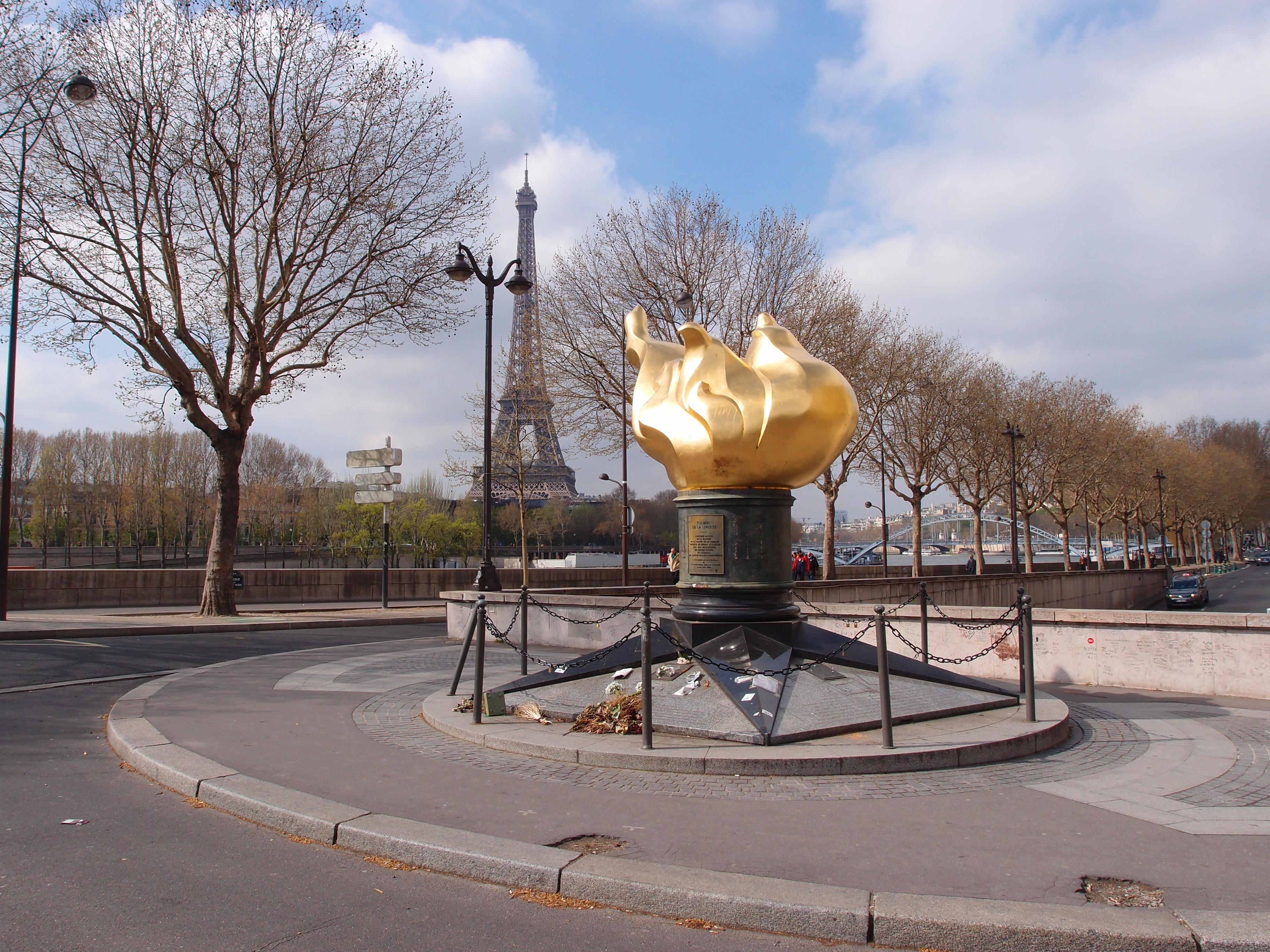 Flamme de la Liberté, Paris.